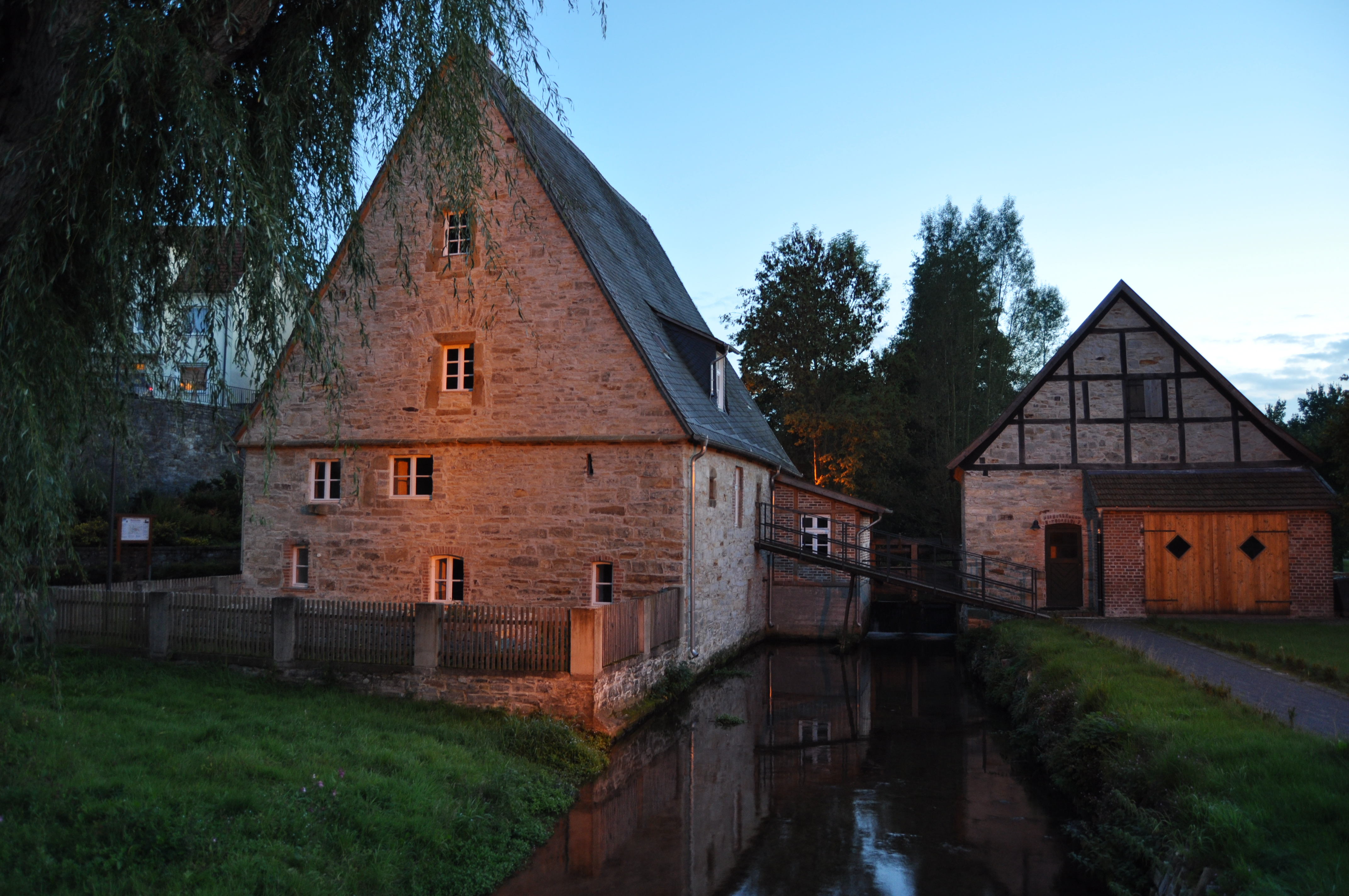 Die Mittelmühle in Büren zur blauen Stunde kurz nach Sonnenuntergang